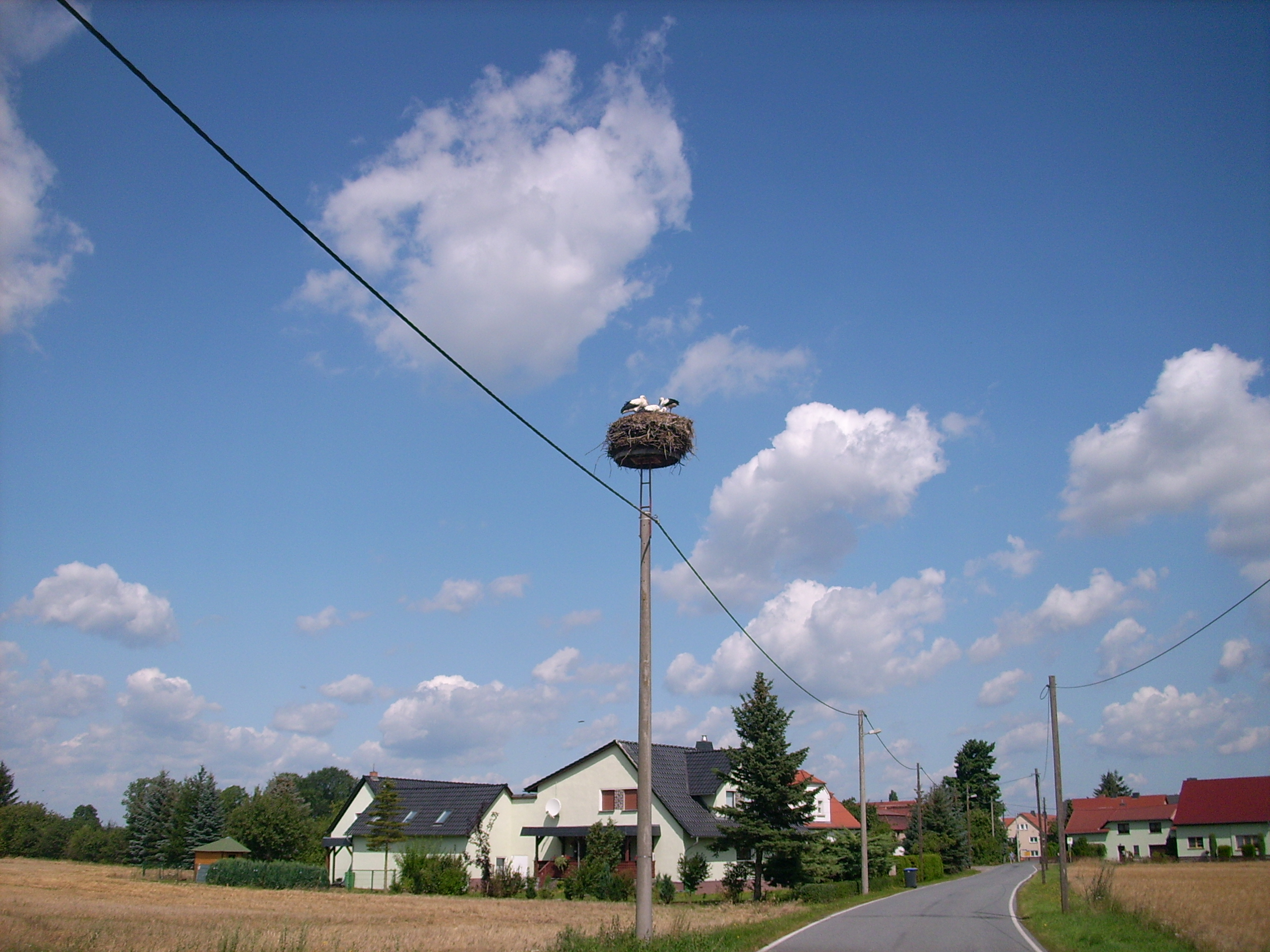 Storchennest in Commerau, Ortsteil von Königswartha Hornjoserbsce: Baćonjace hnězdo w Komorowje pola Rakec